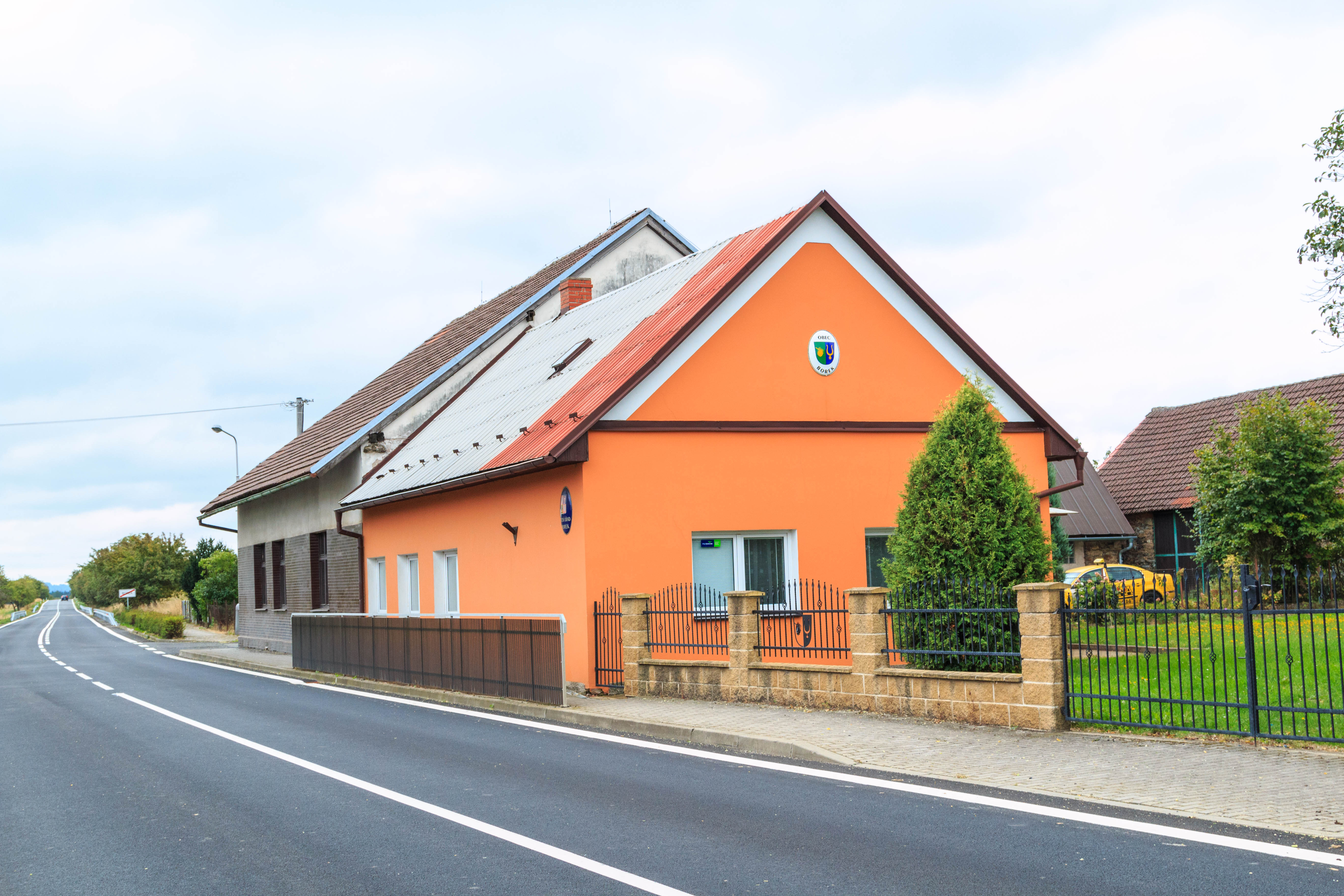 Borek obecní úřad